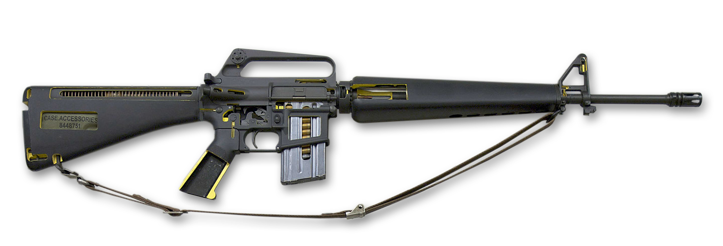 Illustration des amerikanischen Sturmgewehr M16A1 in sog. "Cut-Away-Darstellung" (mit entferntem Hintergrund und "technischem Schatten")